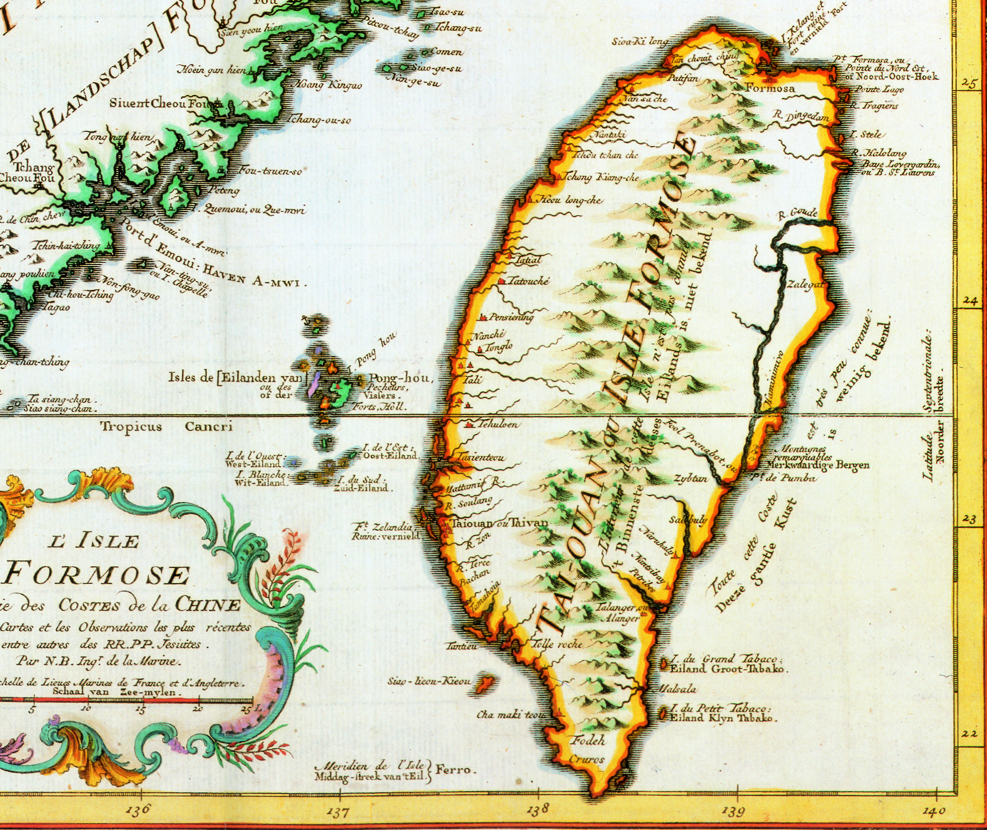 此福爾摩沙島圖為法國製圖師Jacques Nicolas Bellin所作，約繪於18世紀中葉。主要是依據18世紀初期耶穌會教士馮秉正(Joseph Marie de Mailla)等人測繪的資料繪製。東海岸的文字說明為「東岸所知不多」，花蓮地區繪成三個上下相接的小島，此種將台灣花蓮一帶繪成三個小島的地圖，也常見於17、18世紀的西方地圖。而西海岸及東北、東南部的重要港口或城鎮都已經標示出來。